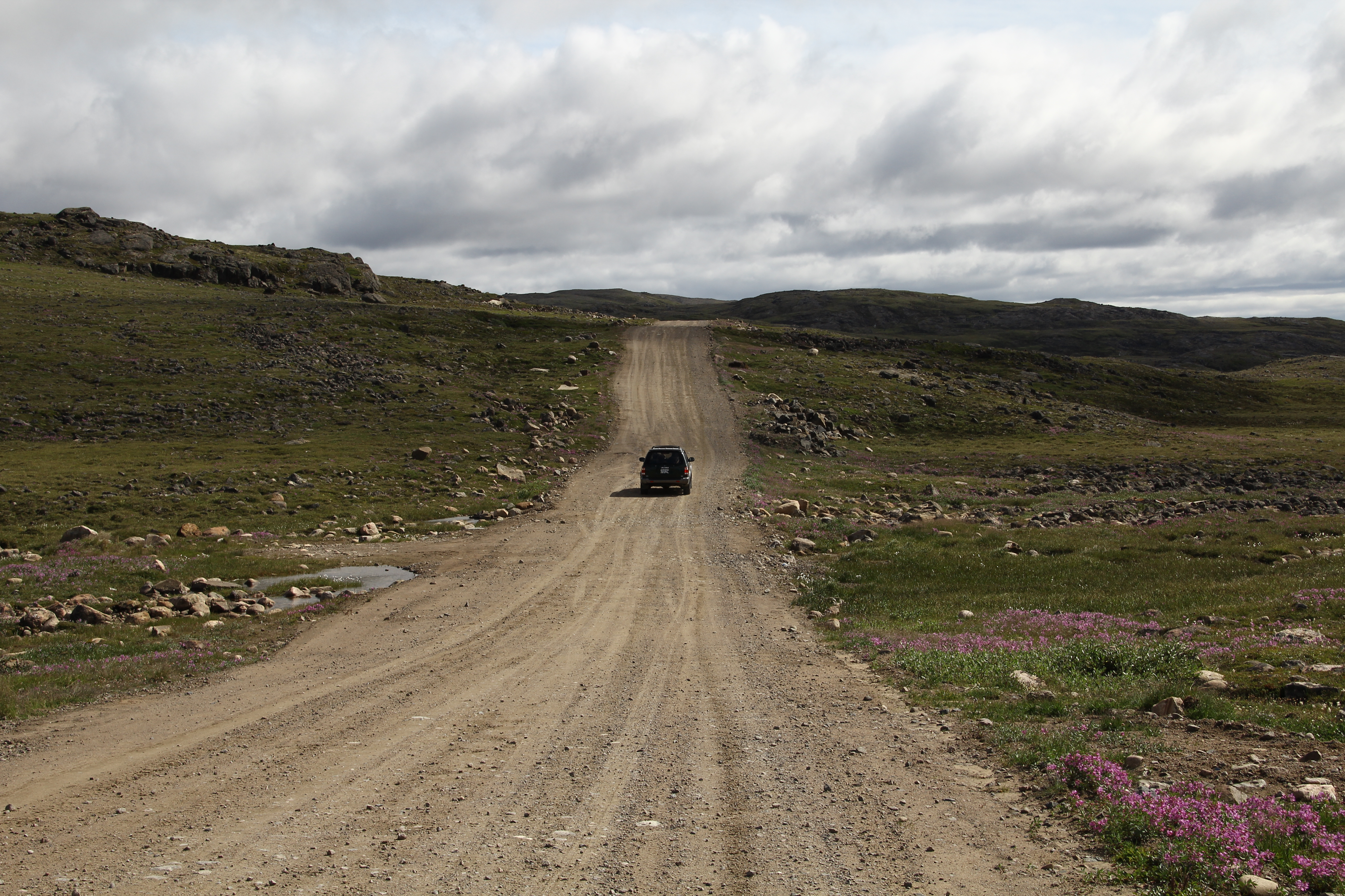 Autoverkehr auf der Road to Nowhere, Iqaluit